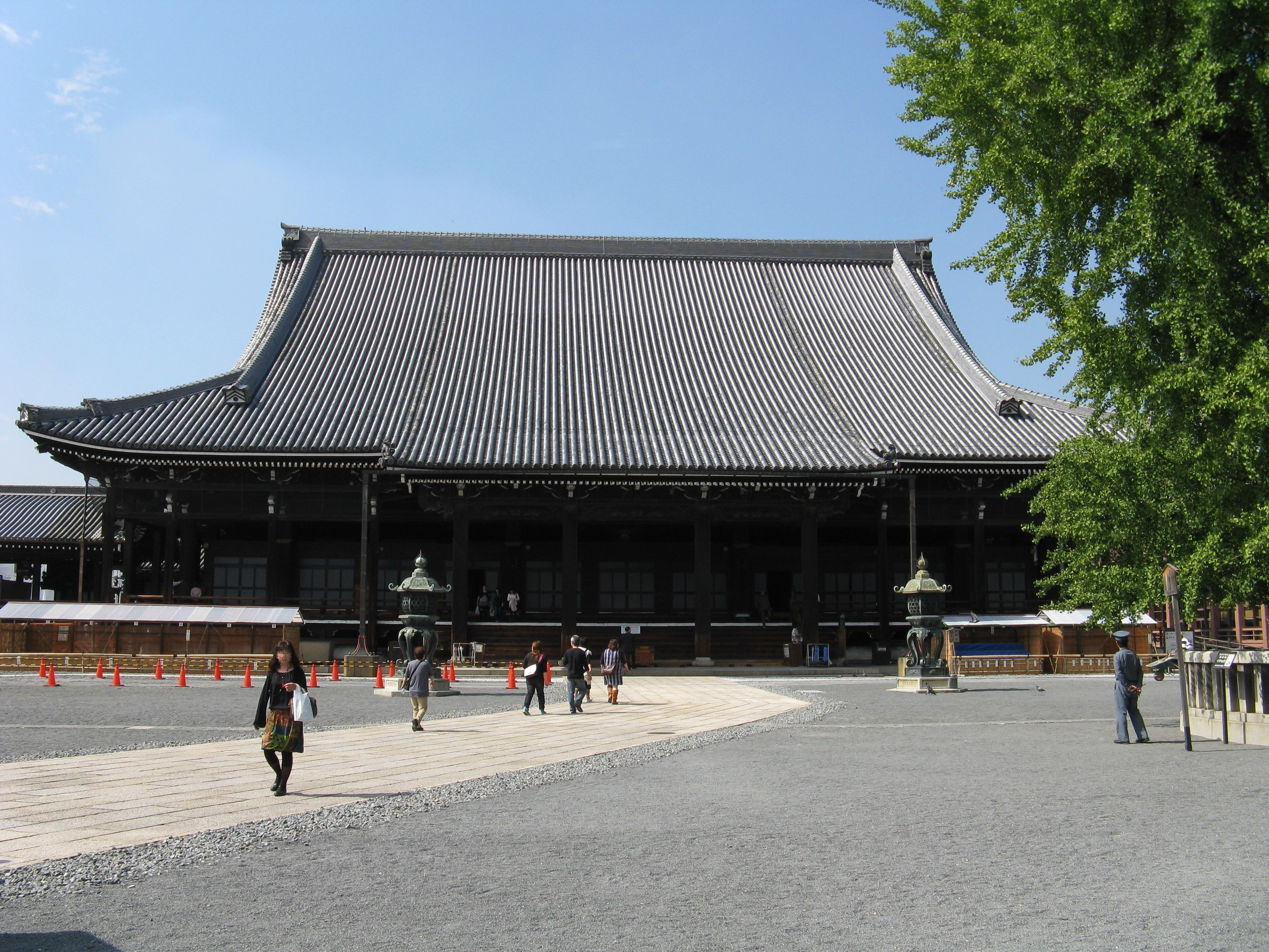 西本願寺 阿弥陀堂